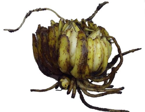 Bulbus Lilium xanthellum, Autor D Barthel